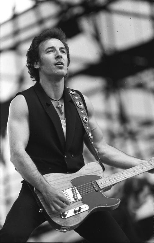 ADN-ZB/Uhlemann/19.7.88/Berlin: Springsteen Konzert/ Der US-amerikanische Sänger und Gitarrist Bruce Springsteen gab zur Eröffung des 5. Berliner Rocksommers ein Konzert auf der Radrennbahn in Weißensee